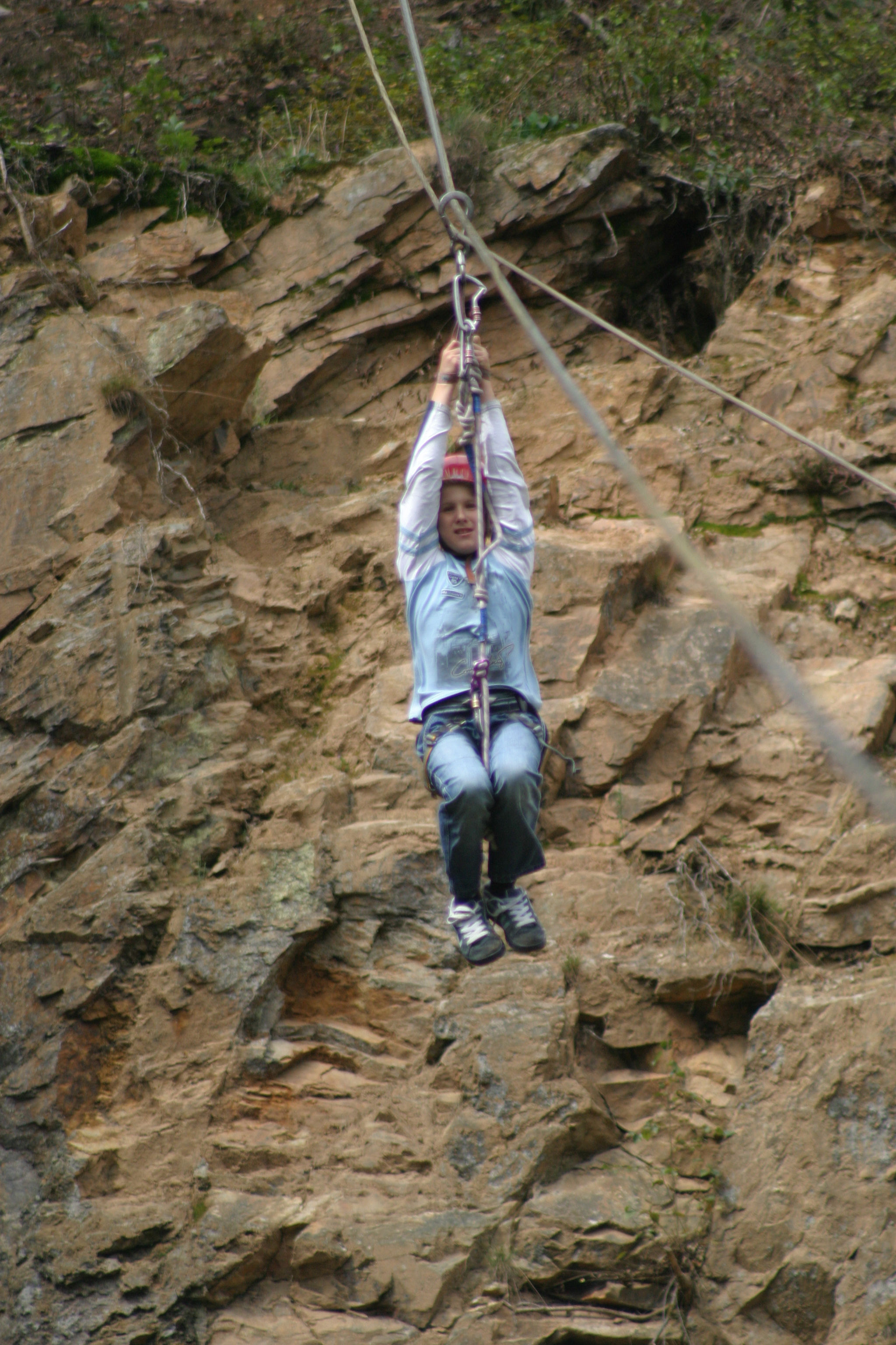 descente en deathride au Parc Aventure Bouillon à Bouillon